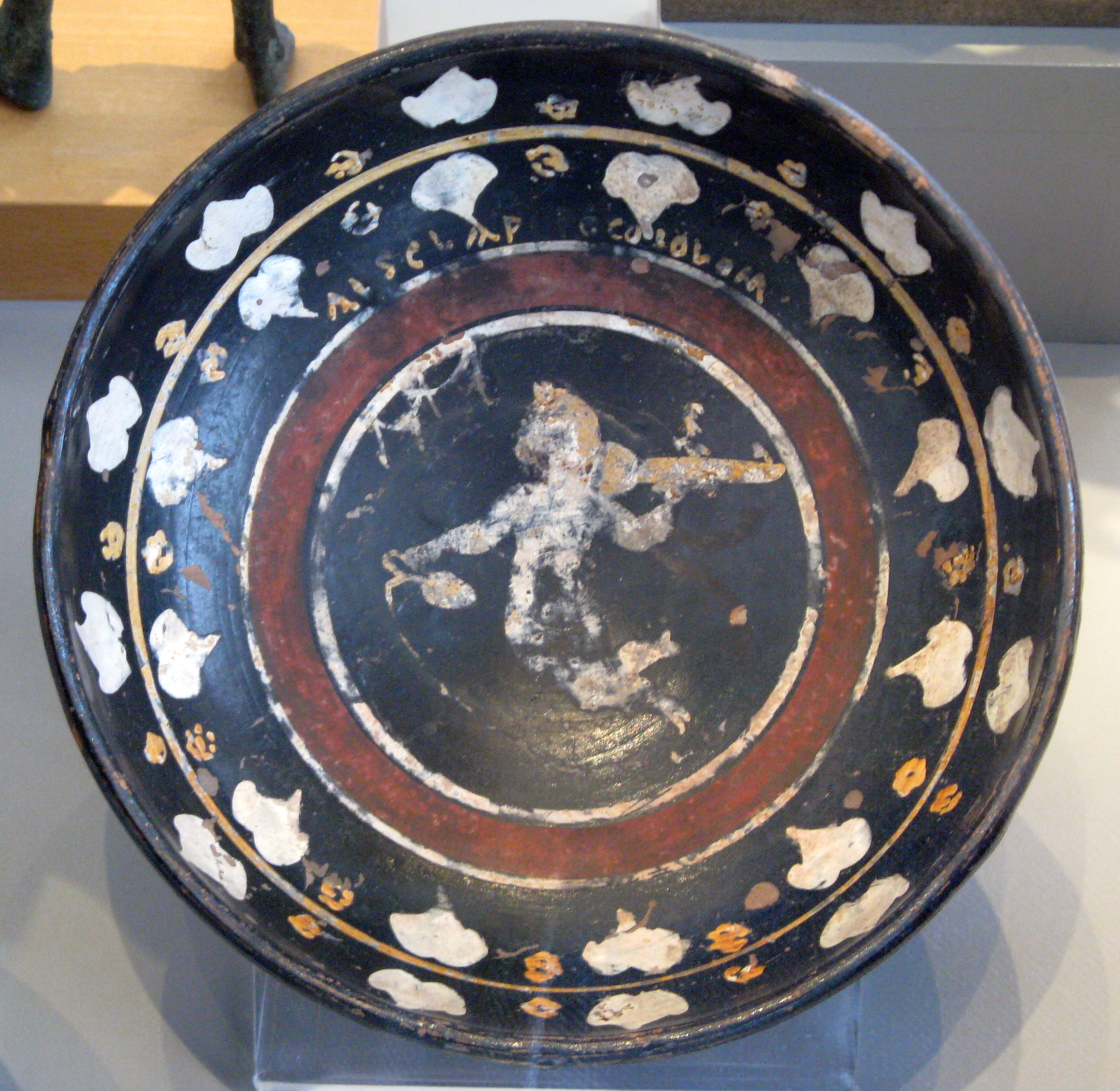 Poccolum-Keramik der Vulkanus-Gruppe in der Antikensammlung Berlin/Altes Museum Berlin: spendender Eros und Aesculapius-Beischrift. Aus Chiusi oder Umgebungi. 3. Jh. v. Chr.